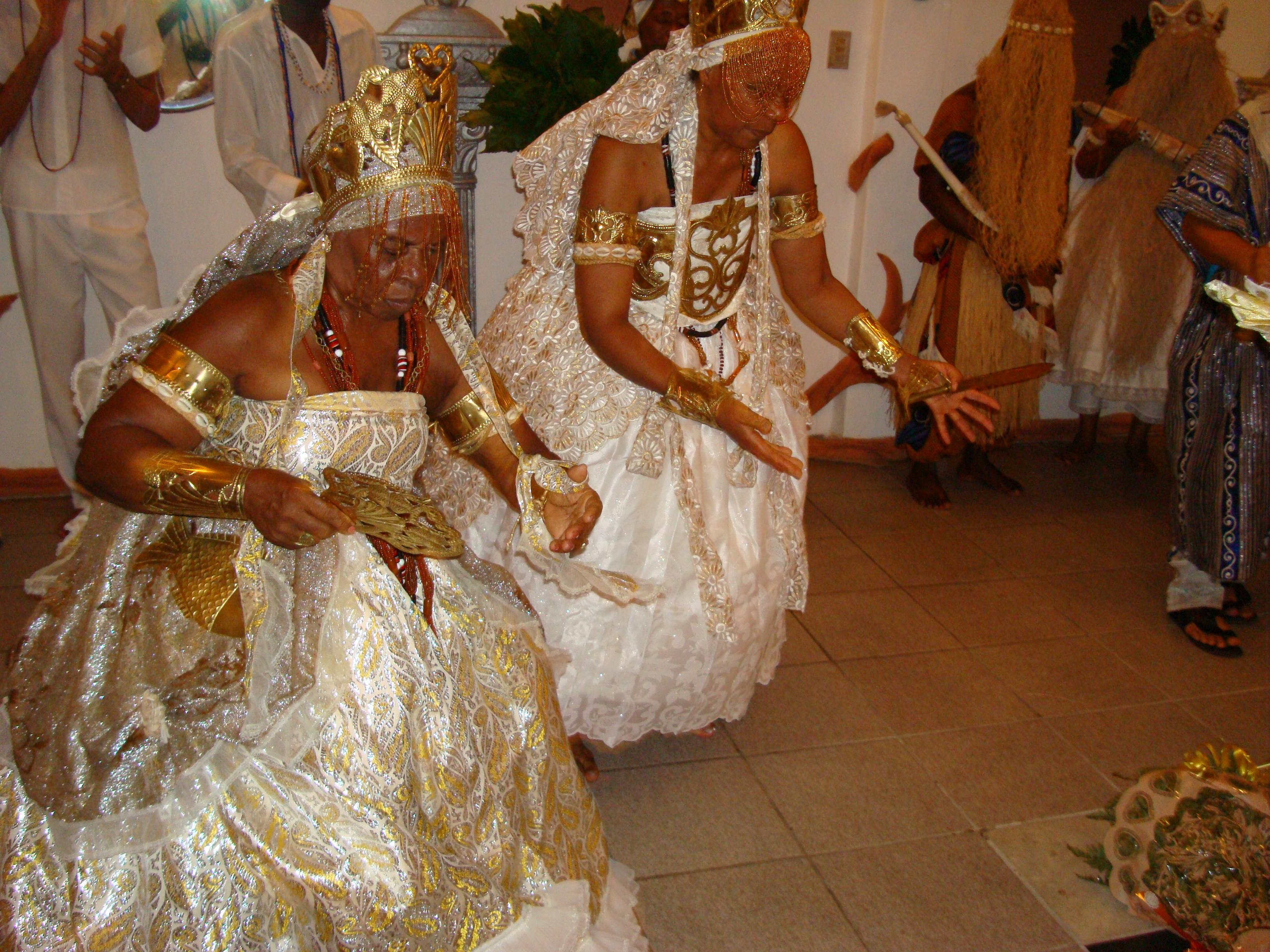 Orixá Oxum, Candomblé, Salvador, Bahia